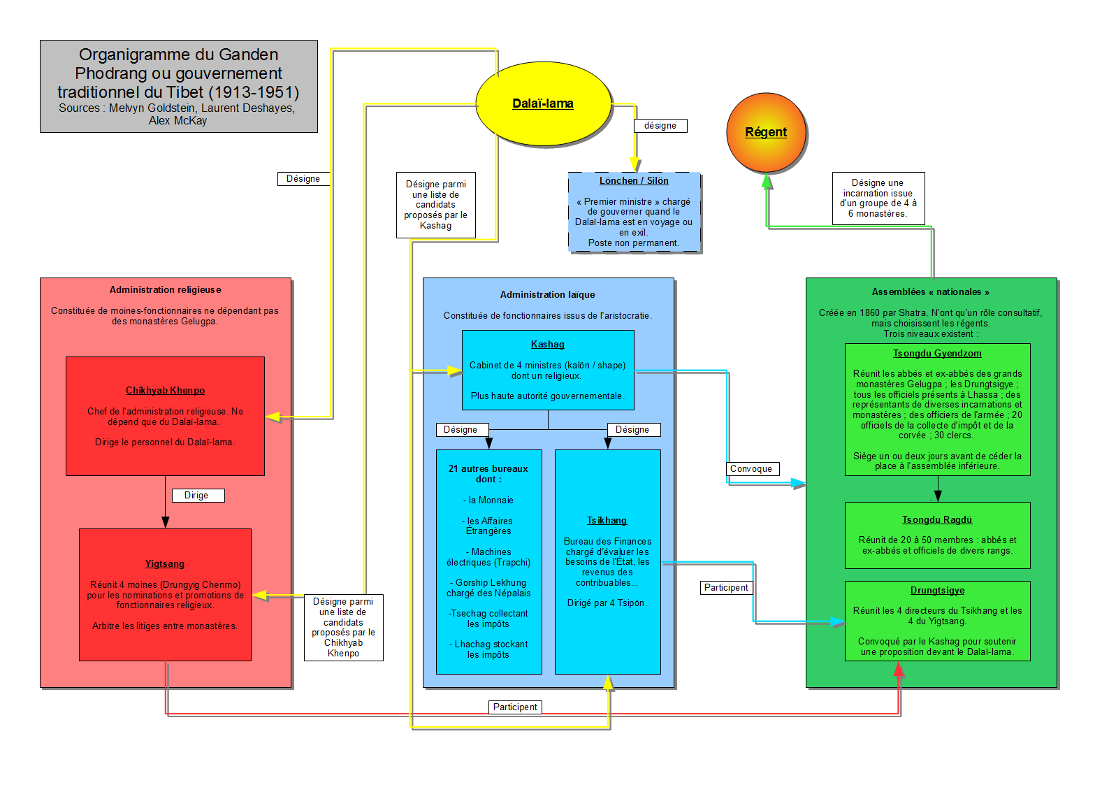 Organigramme du Ganden Phodrang ou gouvernement traditionnel du Tibet (1913-1951) Unknown